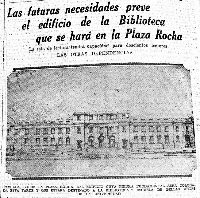 La imagen muestra la fachada del que sería el nuevo edificio para la Biblioteca de la UNLP. La imagen fue publicada el 20 de noviembre de 1934 en el diario El Argentino de la ciudad de La Plata. (página 4)